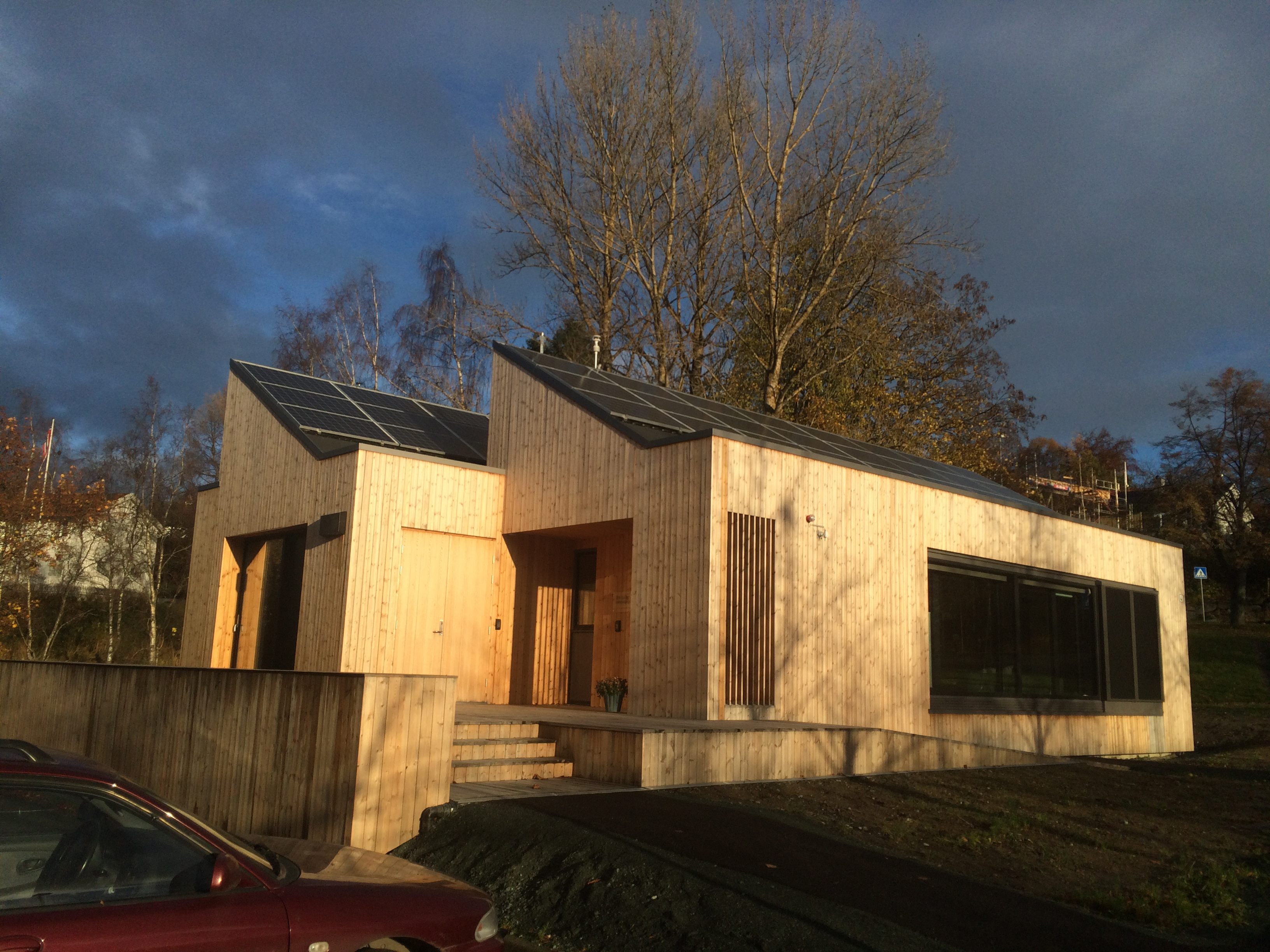 ZEB Living Lab, nullutslippshus, testhus, på campus NTNU Gløshaugen i Trondheim